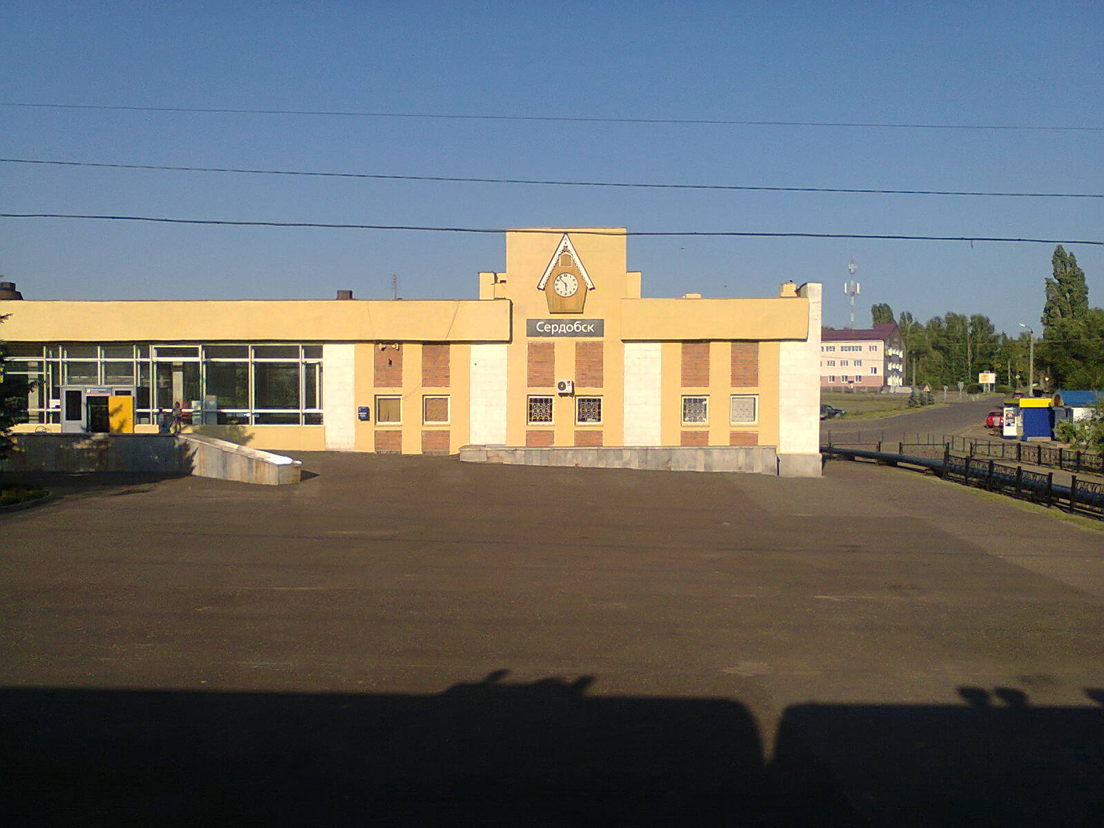 Здание железнодорожной станции Сердобск